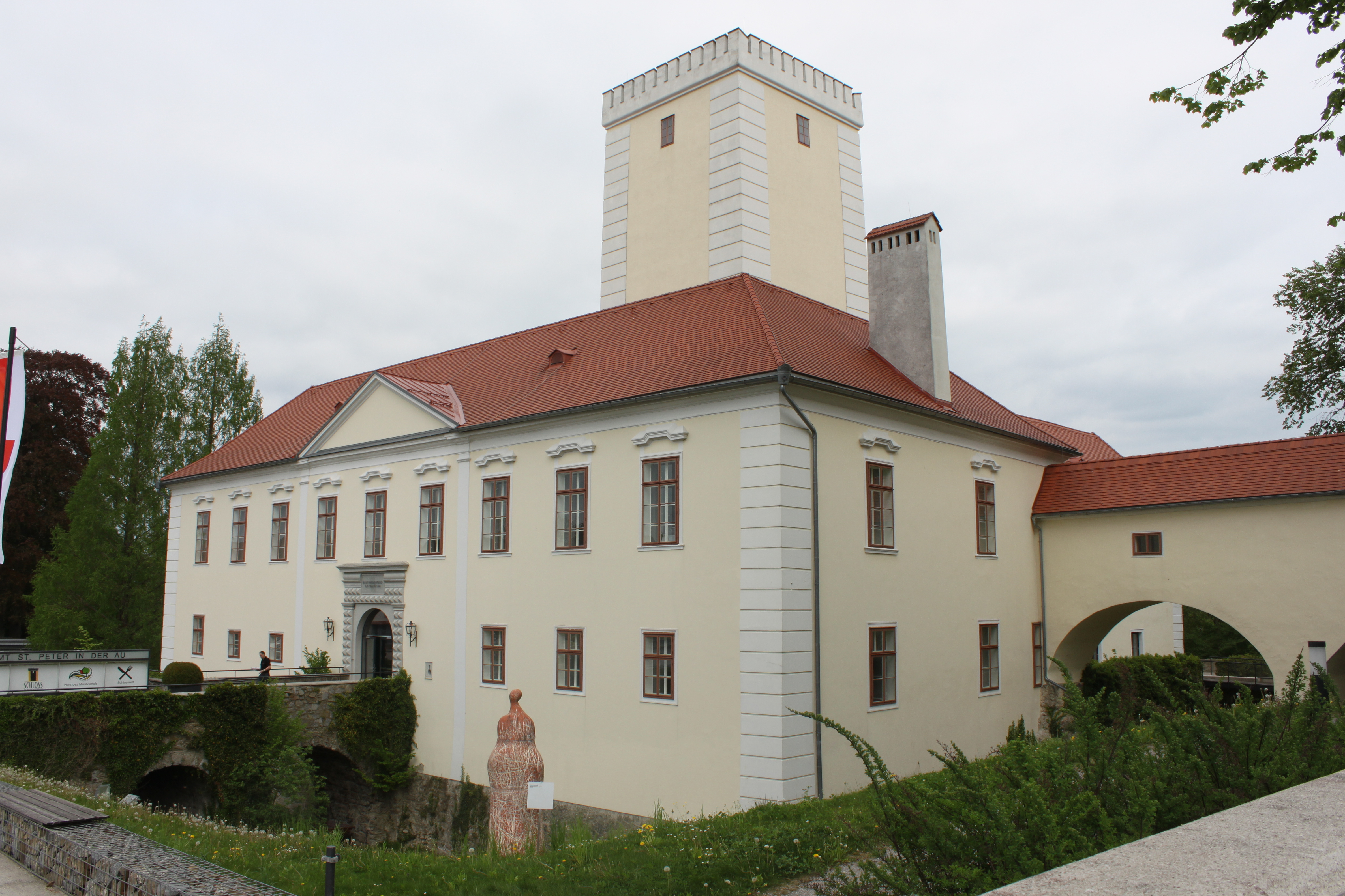 Schloss St. Peter in der Au, Hauptfront mit Brücke über trockenen Graben